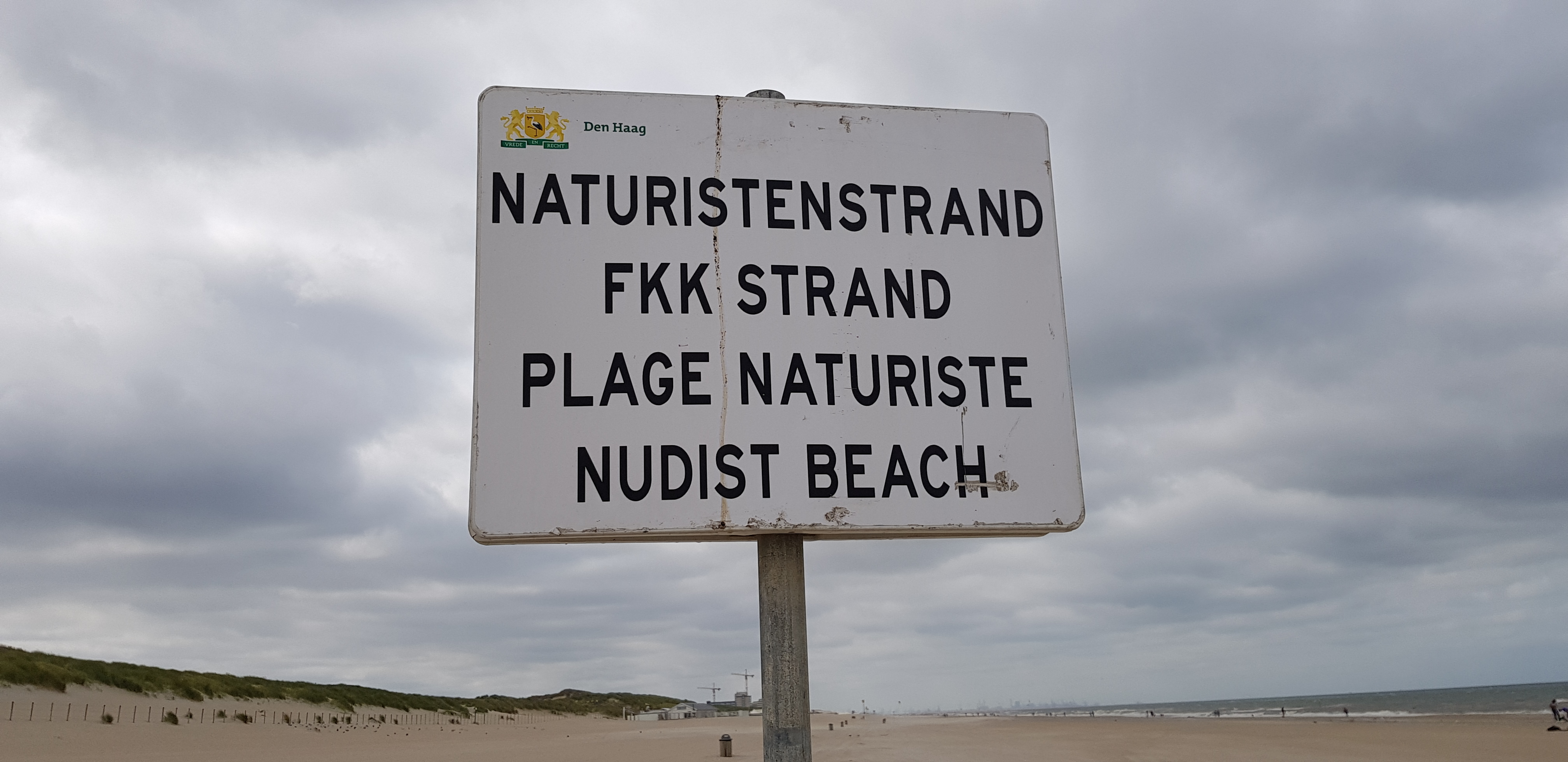 Het bord aan de rand van het naaktstrand van Westduinpark in Den Haag